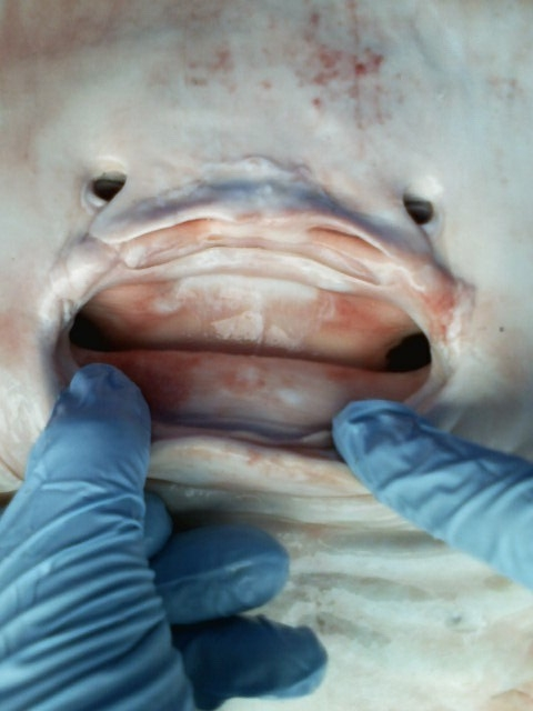 Гладкий скат бабочка